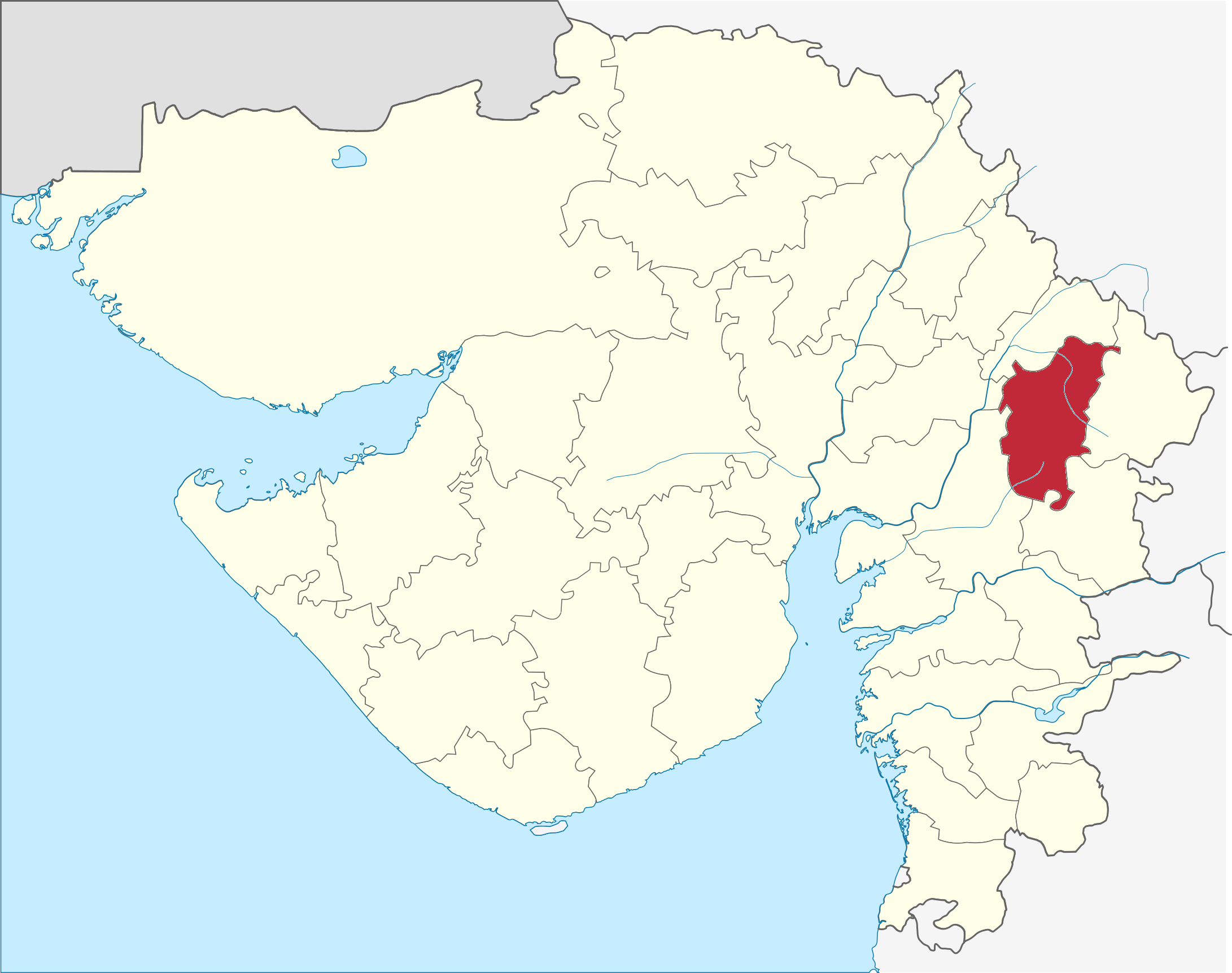 Distrito de Panchmahal en Gujarat